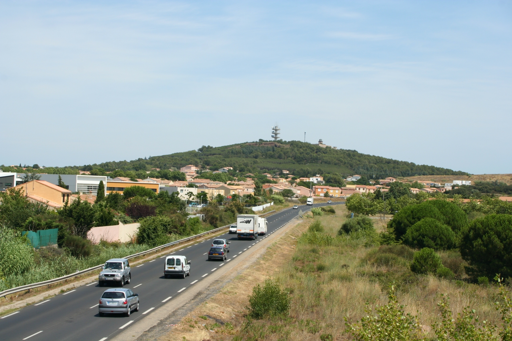 Vue du mont Saint-Loup à Agde (Hérault, France). La route au premier plan est la RD 612 (ex RN 112) qui contourne le mont par le sud.